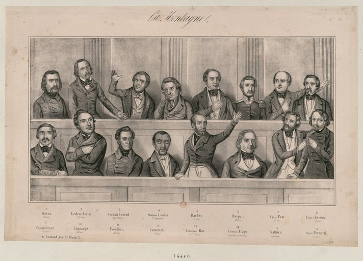 Buffet. Lithographe.- Portrait collectif de 16 Représentants à leurs bancs de l'Assemblée sur 2 rangs. Estampe in revue "La Montagne", Léotaud, Éditeur, quai Saint-Michel, 11